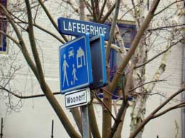 Foto gemaakt in december 2005: Lafeberhof aan de Nieuwehaven in Gouda.